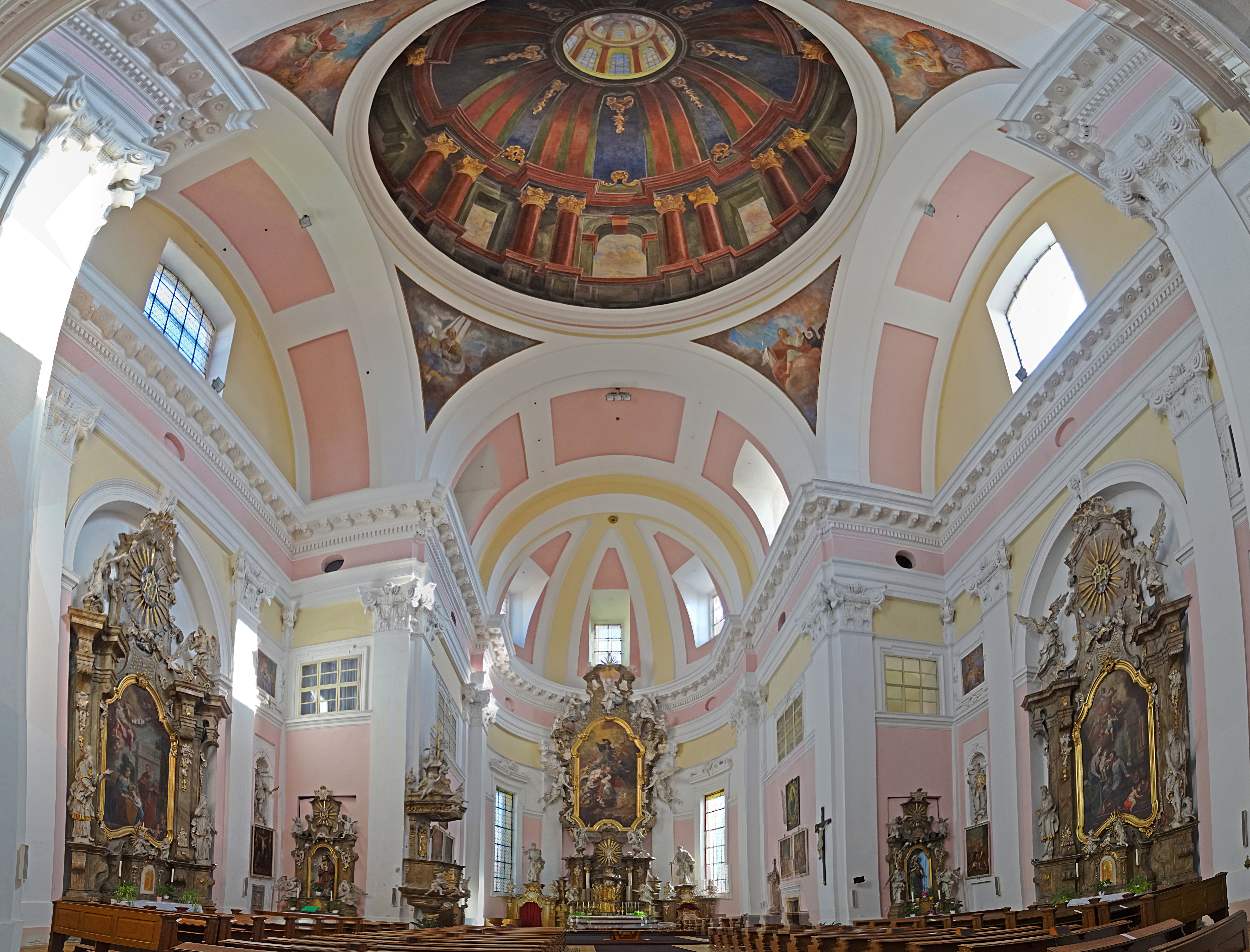 Innenraum-Panorama der Kirche des Hl. Jakobus des Älteren in Jičín